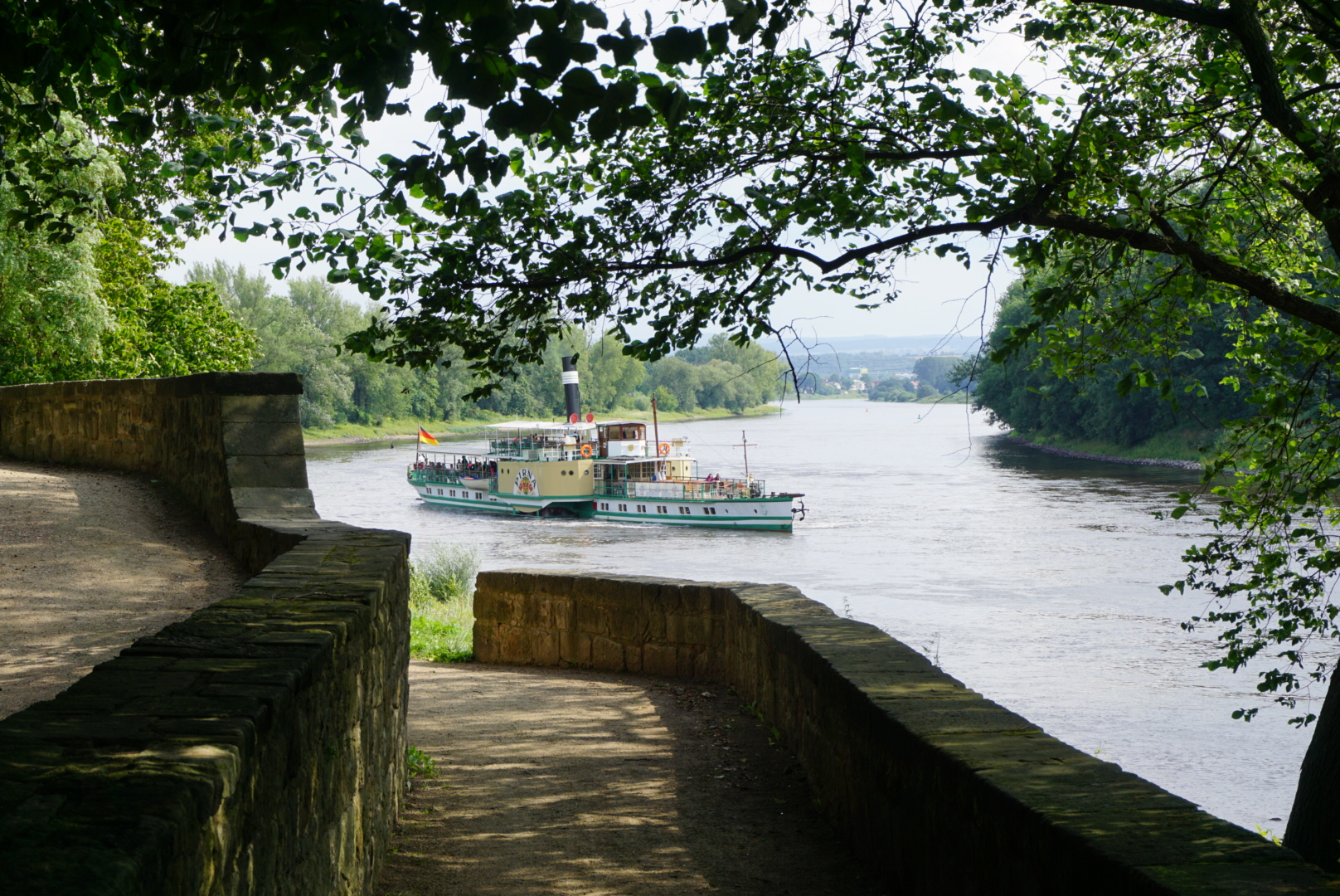 Der Elb-Schaufelraddampfer "Pirna" in der Nähe von Pillnitz